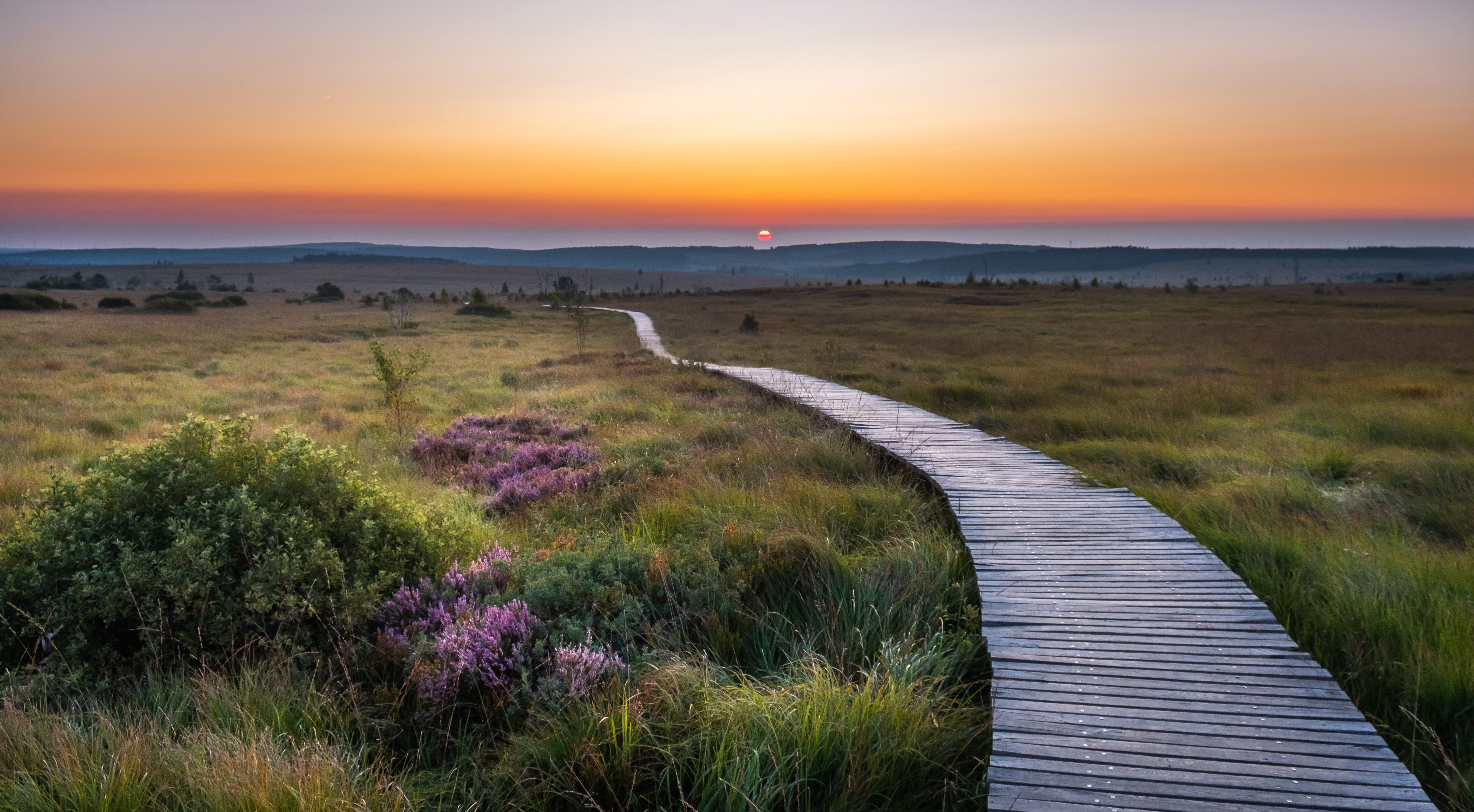 Hohes Venn im Spätsommer, Sonnenaufgang